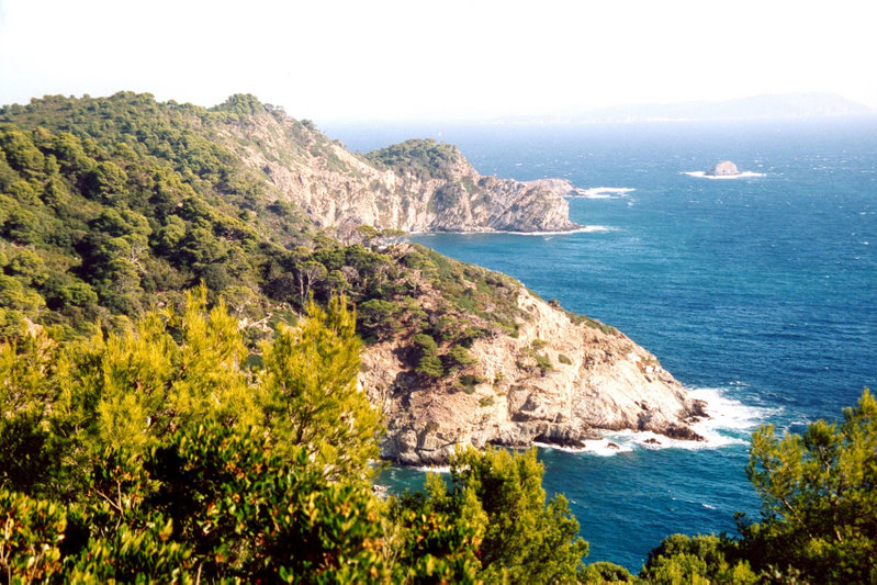 French Wikipedia L'Ile de Porquerolles (Var) Auteur : GIRAUD Patrick